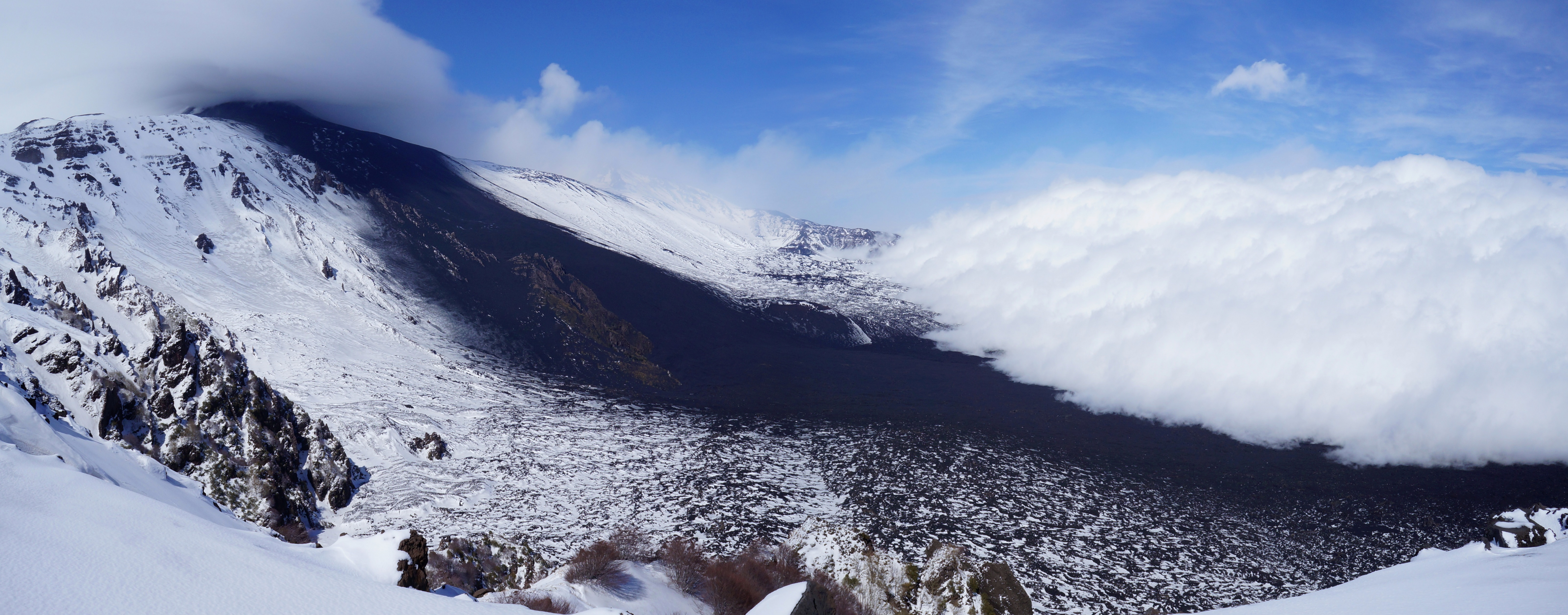 Etna volcano - 1 day after an eruption. Sicilia - Italia